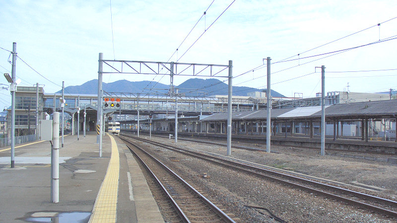 JRja:鹿児島本線ja:門司駅 構内 5番ホームから撮影。写真右が南口。 写真奥がja:門司港駅方面、写真手前が小倉駅方面。 撮影者/著者/著作権保有者 : MK Products (本人がアップロード) 撮影日 : 2007/01/19 門司駅用にアップロードした画像です。良い画像があれば別の画像に変えてください。